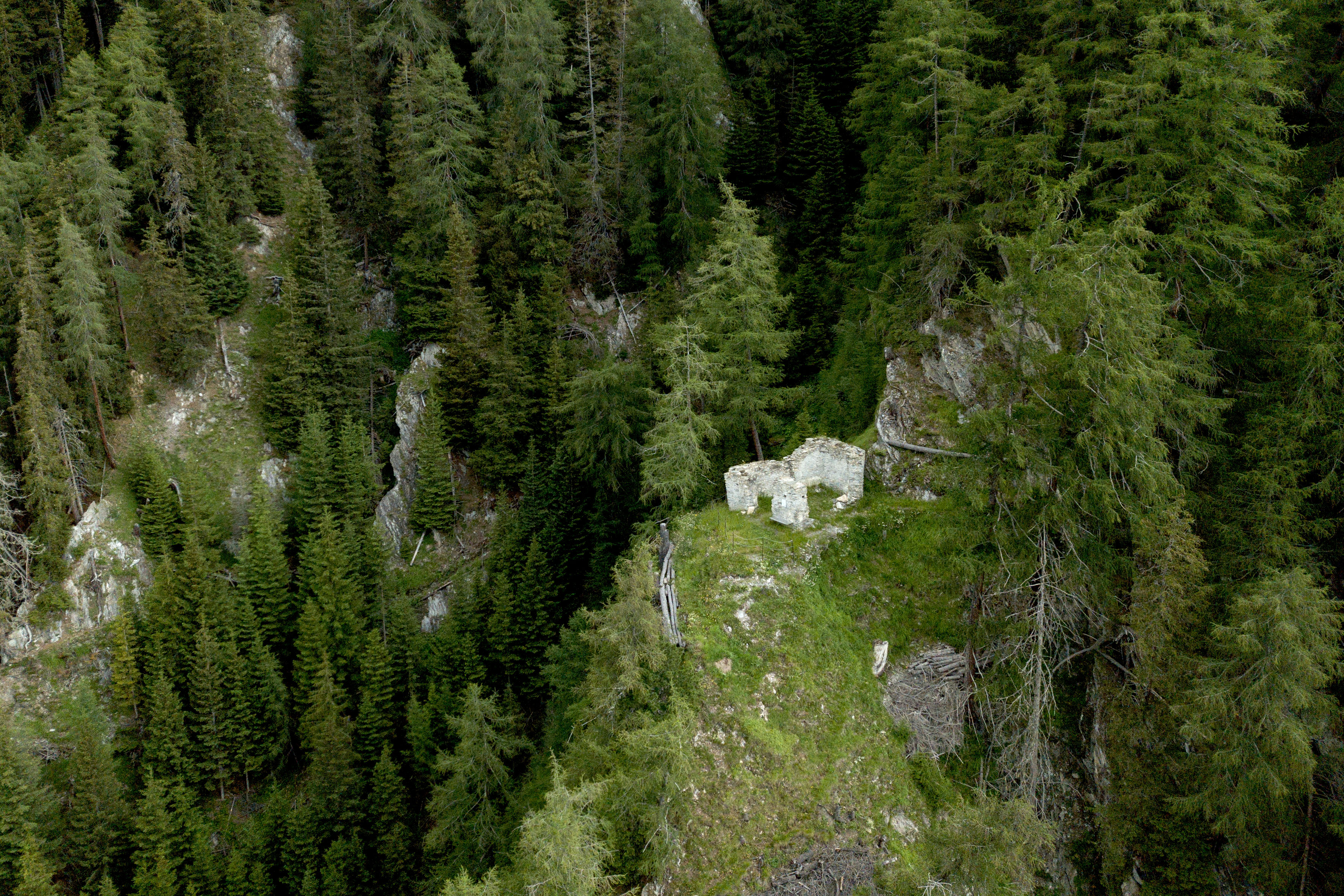 Kirchruine St. Peter in Kals am Großglockner